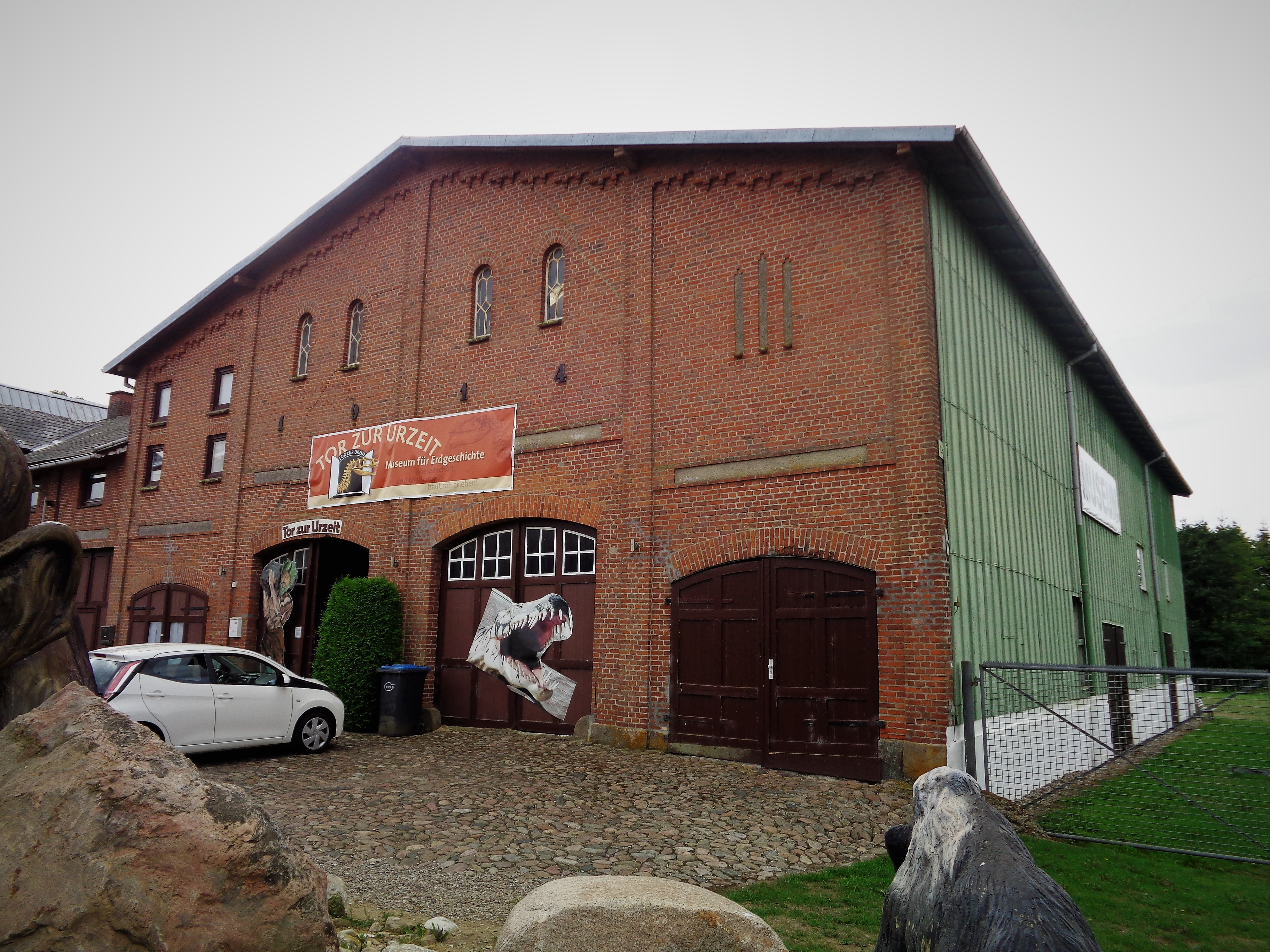 Die Außenansicht des Museums "Tor zur Urzeit" in Brügge.